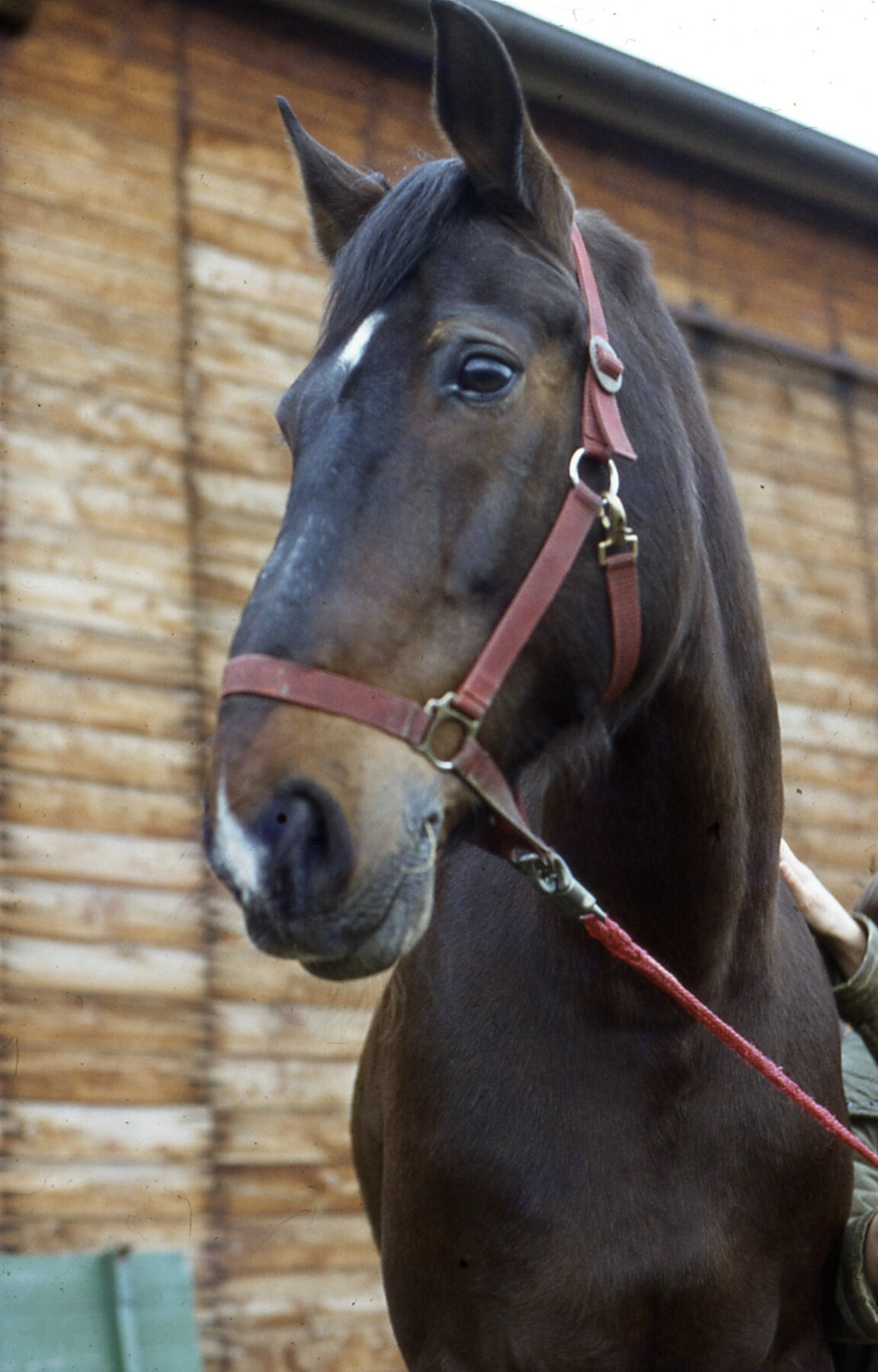 WürttembergerFreeman1979